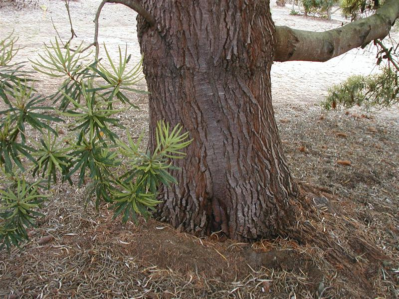 Banksia seminuda trunk Banksia Farm, Mt Barker, WA Photo: Cas Liber